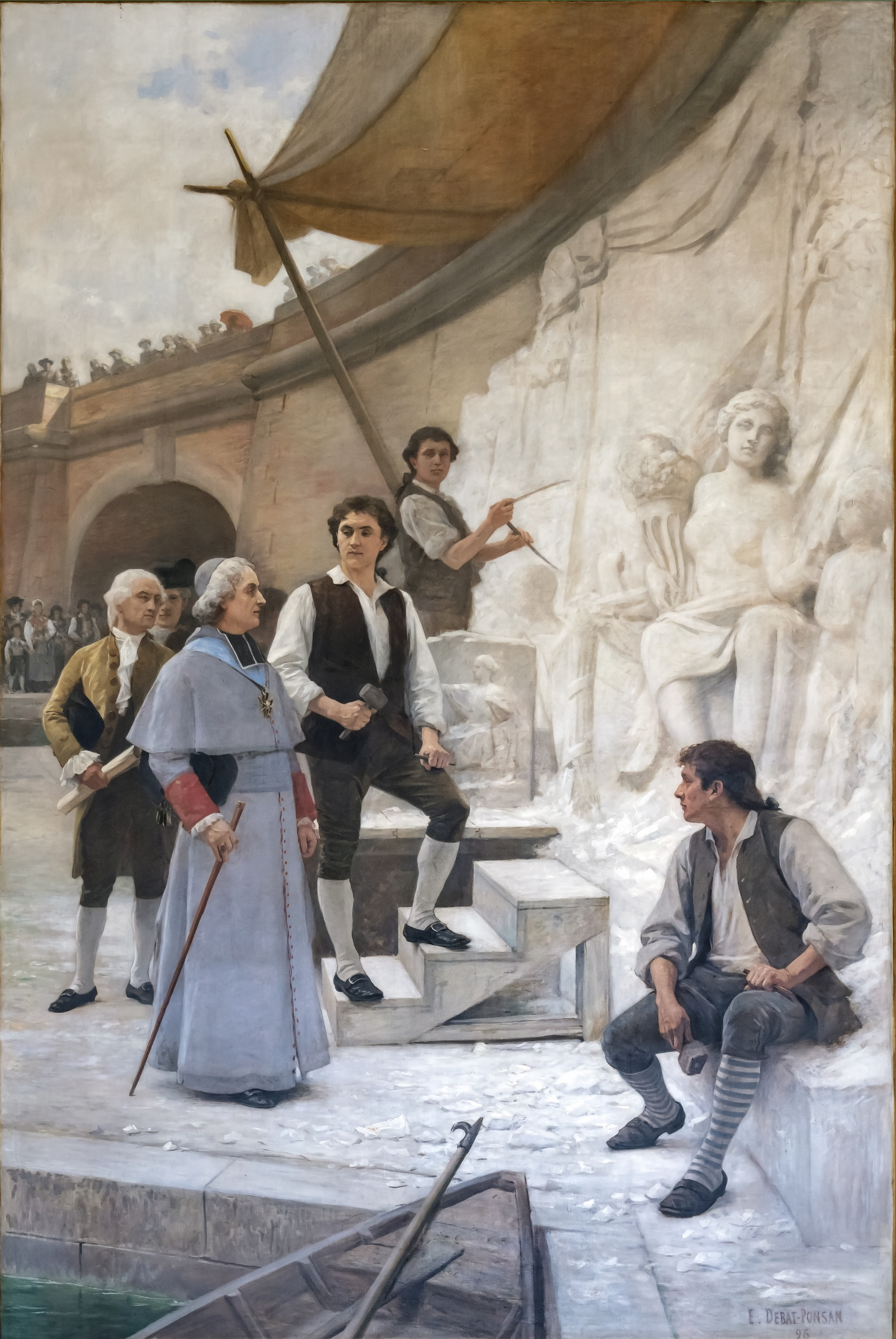 Depicted person: François Lucas – French artist (1736-1813) Depicted person: Étienne Charles de Loménie de Brienne – Catholic cardinal